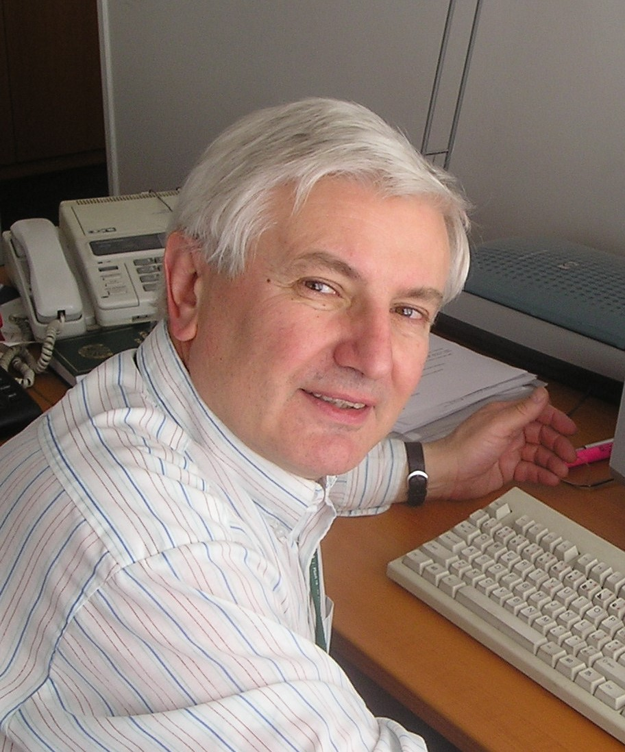 významný český vědec a výzkumník, který pracoval na výzkumných úkolech v oblasti pivovarství a sladařství